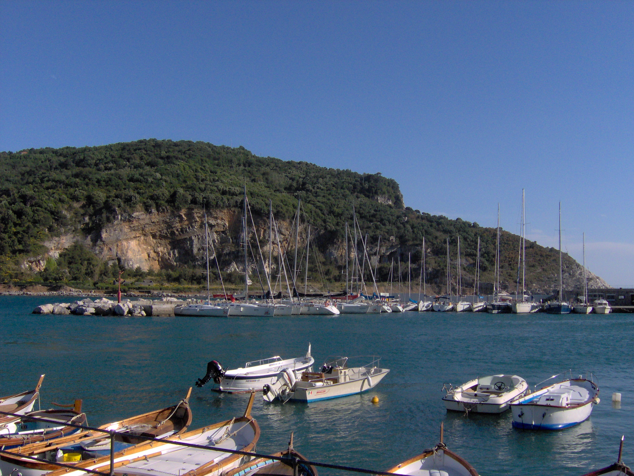 Foto della Punta settentrionale dell'Isola Palmaria. William Domenichini. 30 maggio 2005. ore 18.30 circa